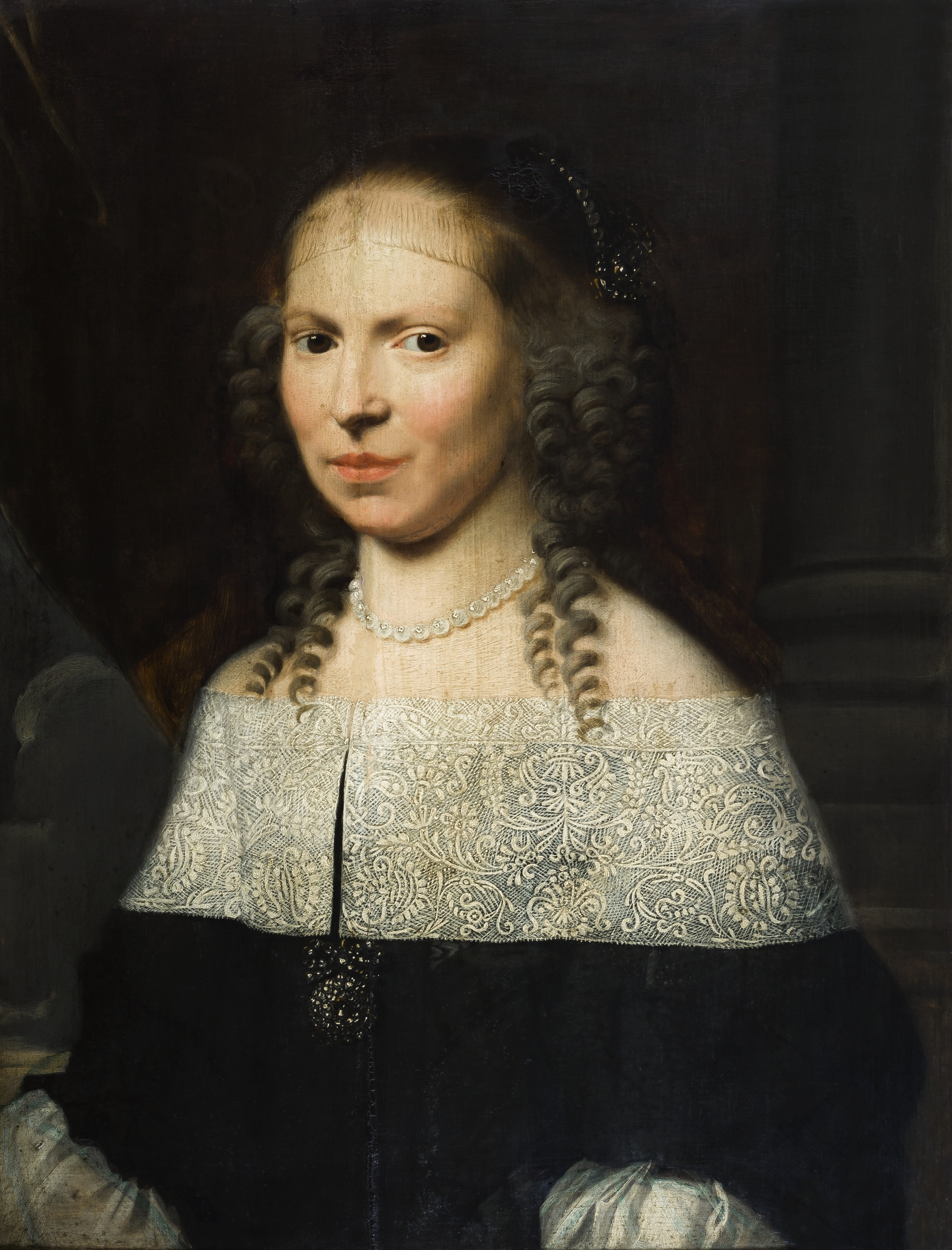 schilderij ( Jacob van Reesbroeck ( Museum Plantin-Moretus